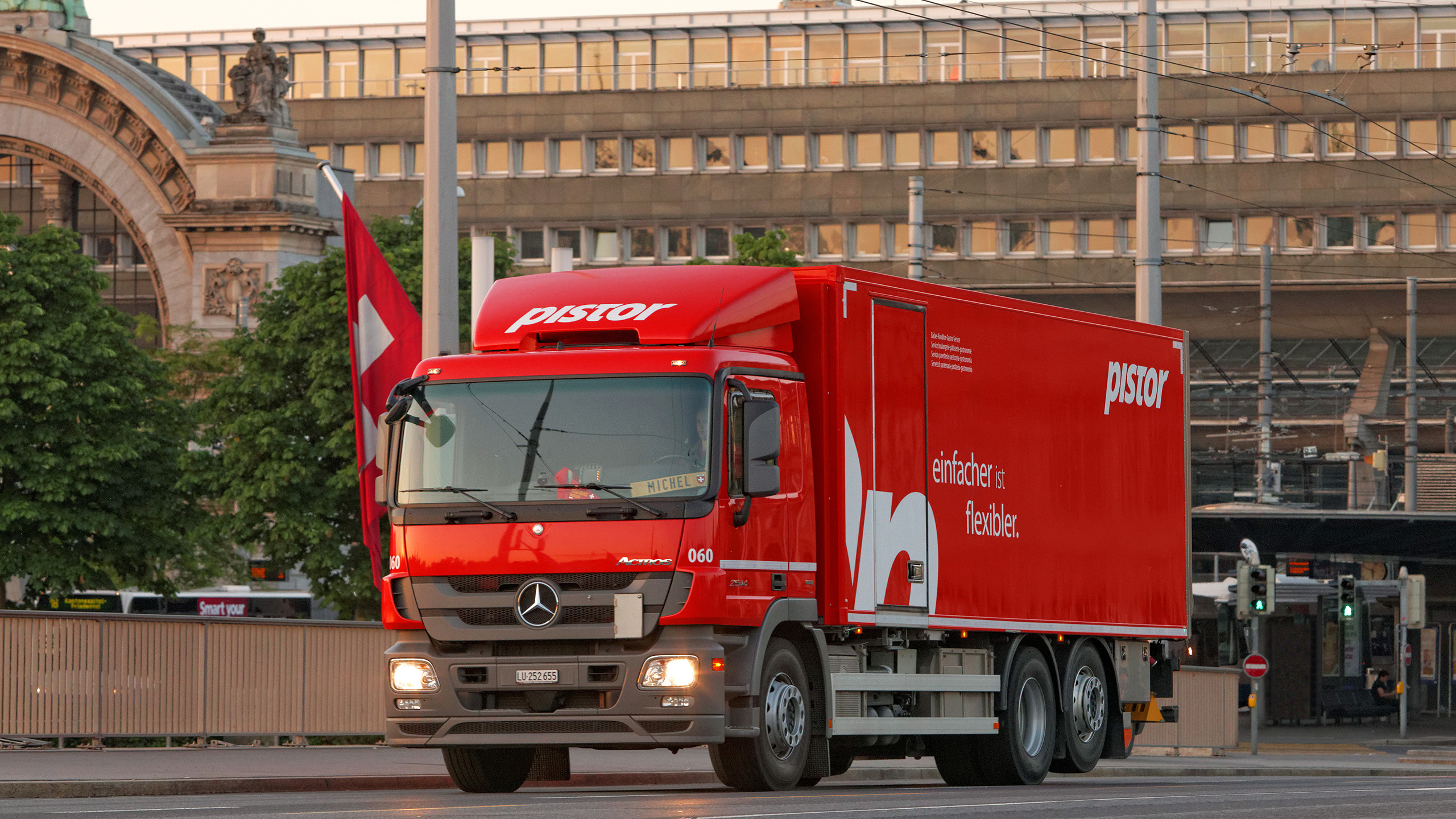 Deitsch: LKW Pistor AG in Luzern